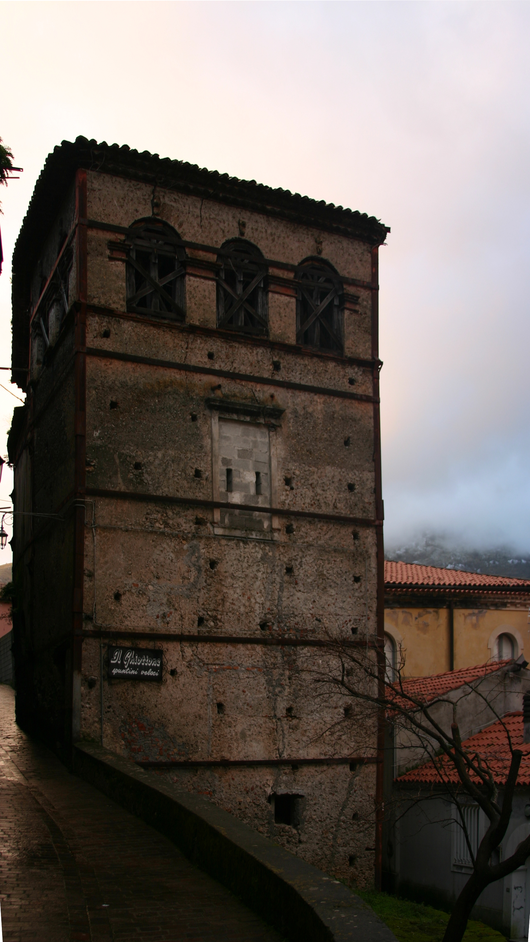 Maratea